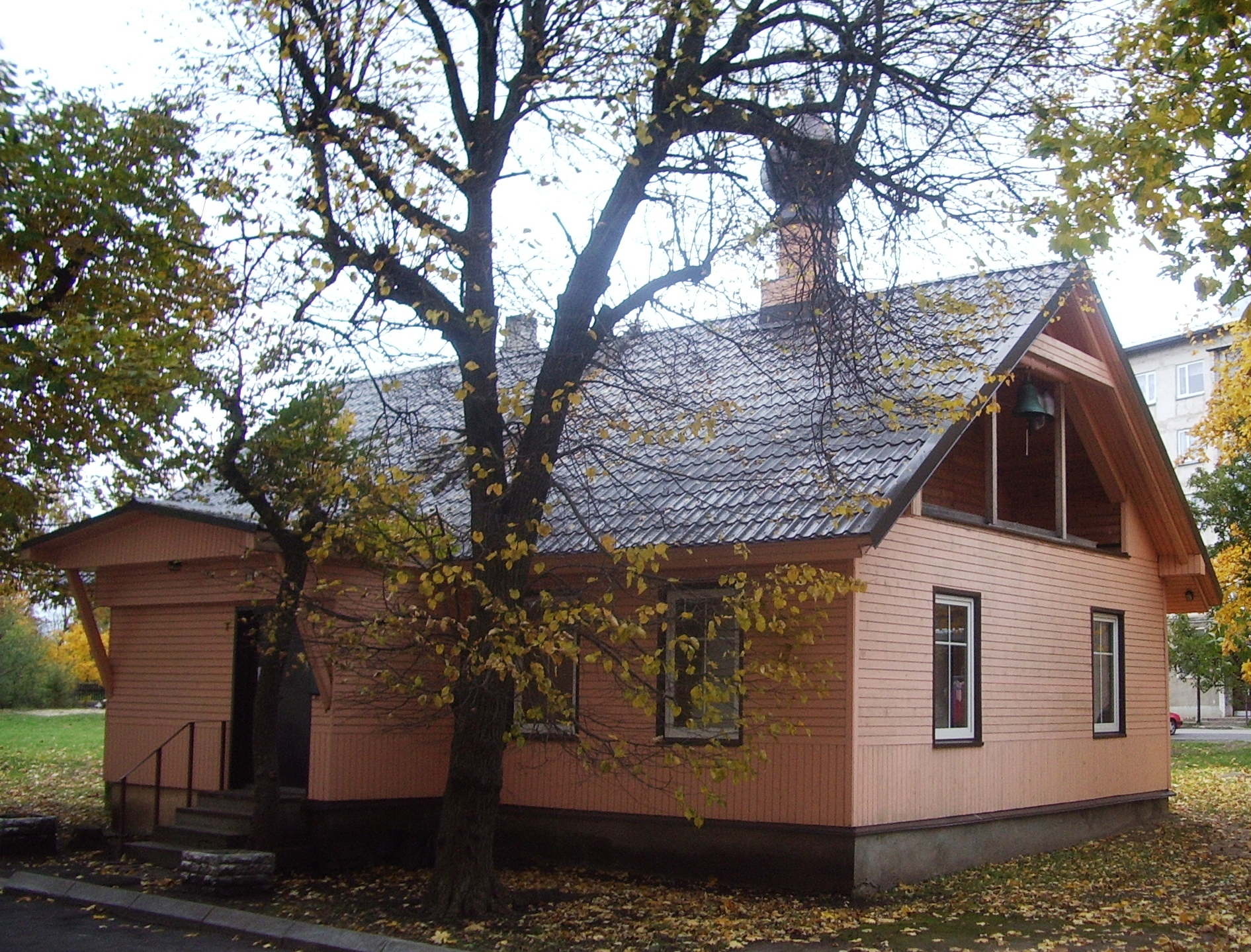 Paldiski suurmärter Panteleimoni kirik Muuli 4